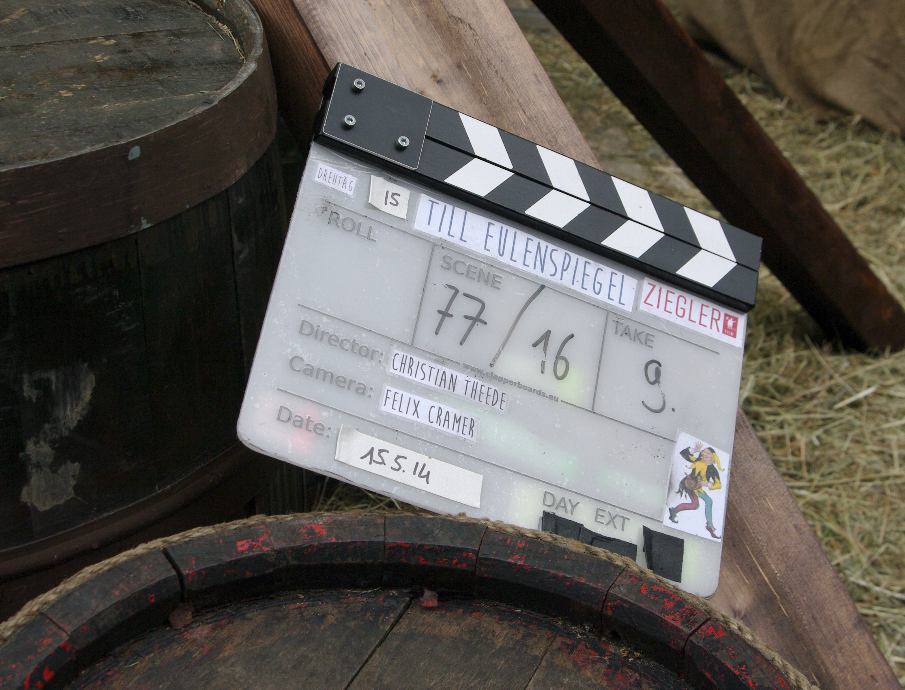 Dreharbeiten zu TILL EULENSPIEGEL 15. Mai 2014 in Quedlinburg